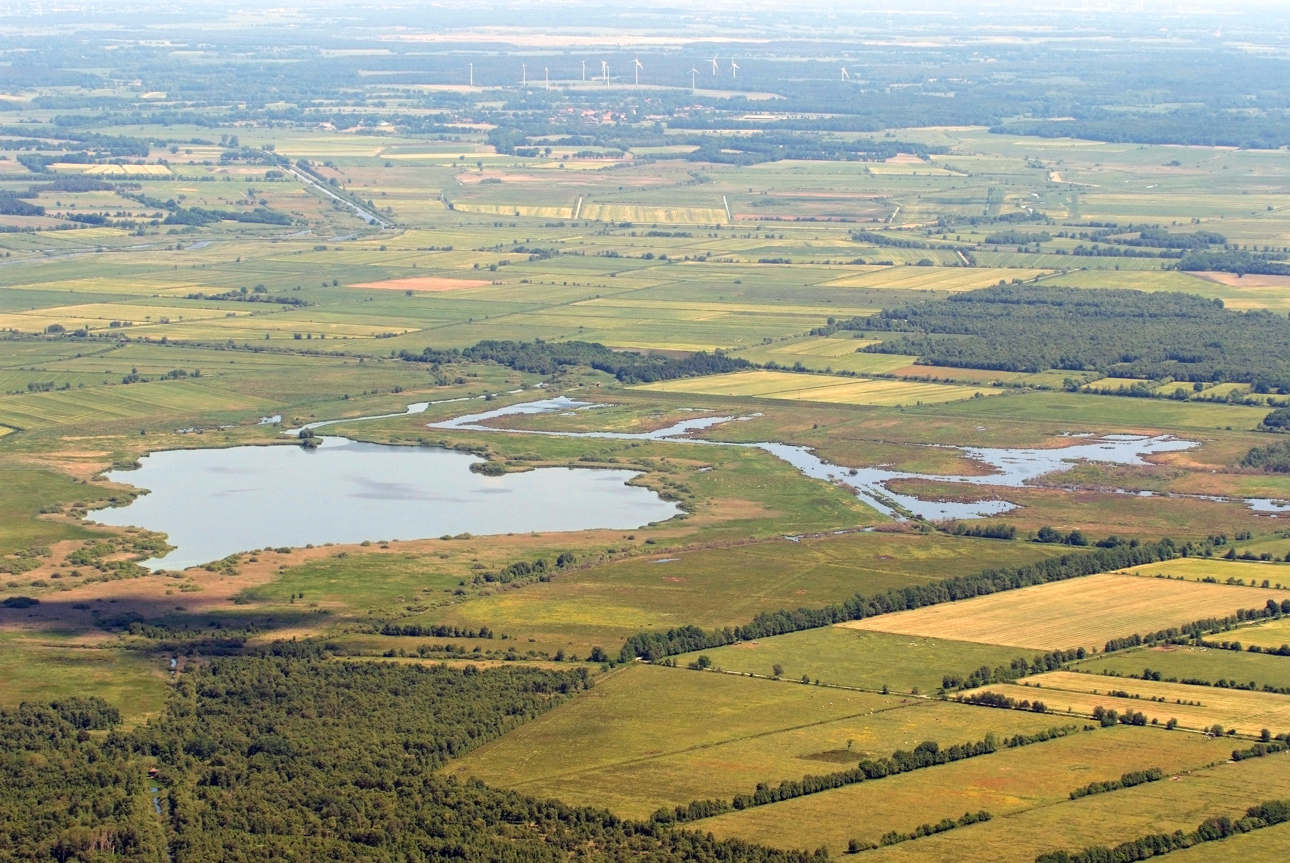 Luftbild vom Sellstedter See und Ochsentriftmoor (Fotoflug vom Flugplatz Nordholz-Spieka über Cuxhaven und Wilhelmshaven)